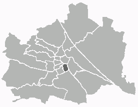 Positionskarte des 4. Wiener Gemeindebezirks Unter Verwendung einer Vorlage von Extrawurst. Public Domain.